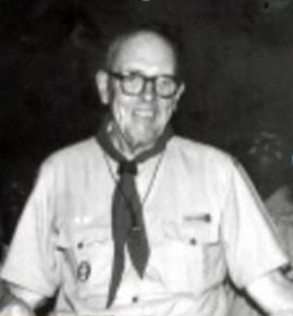 ویلیام دورانت کمپبل